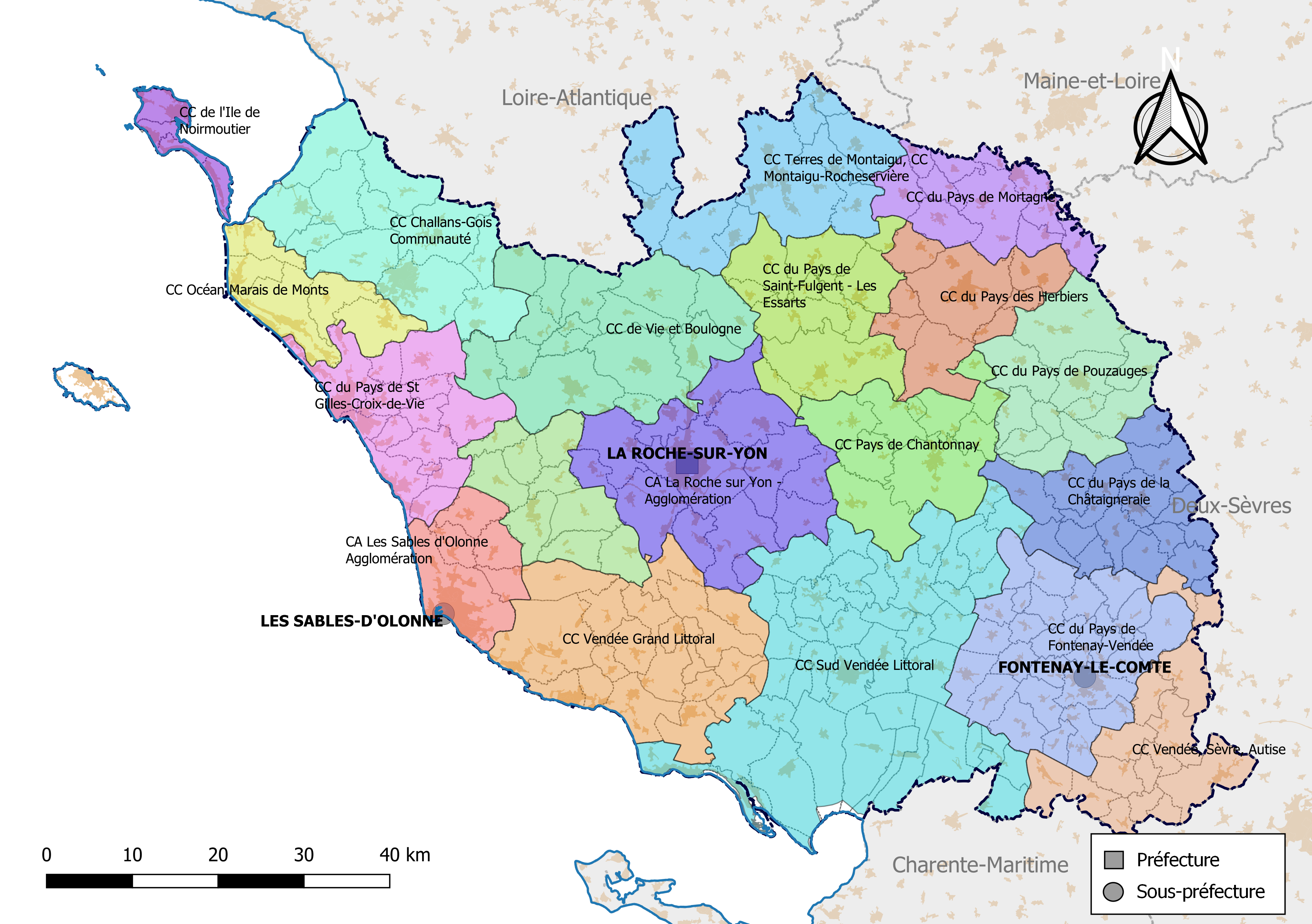 Carte des intercommunalités du département de la Vendée, France. Composition au 1er janvier 2019.